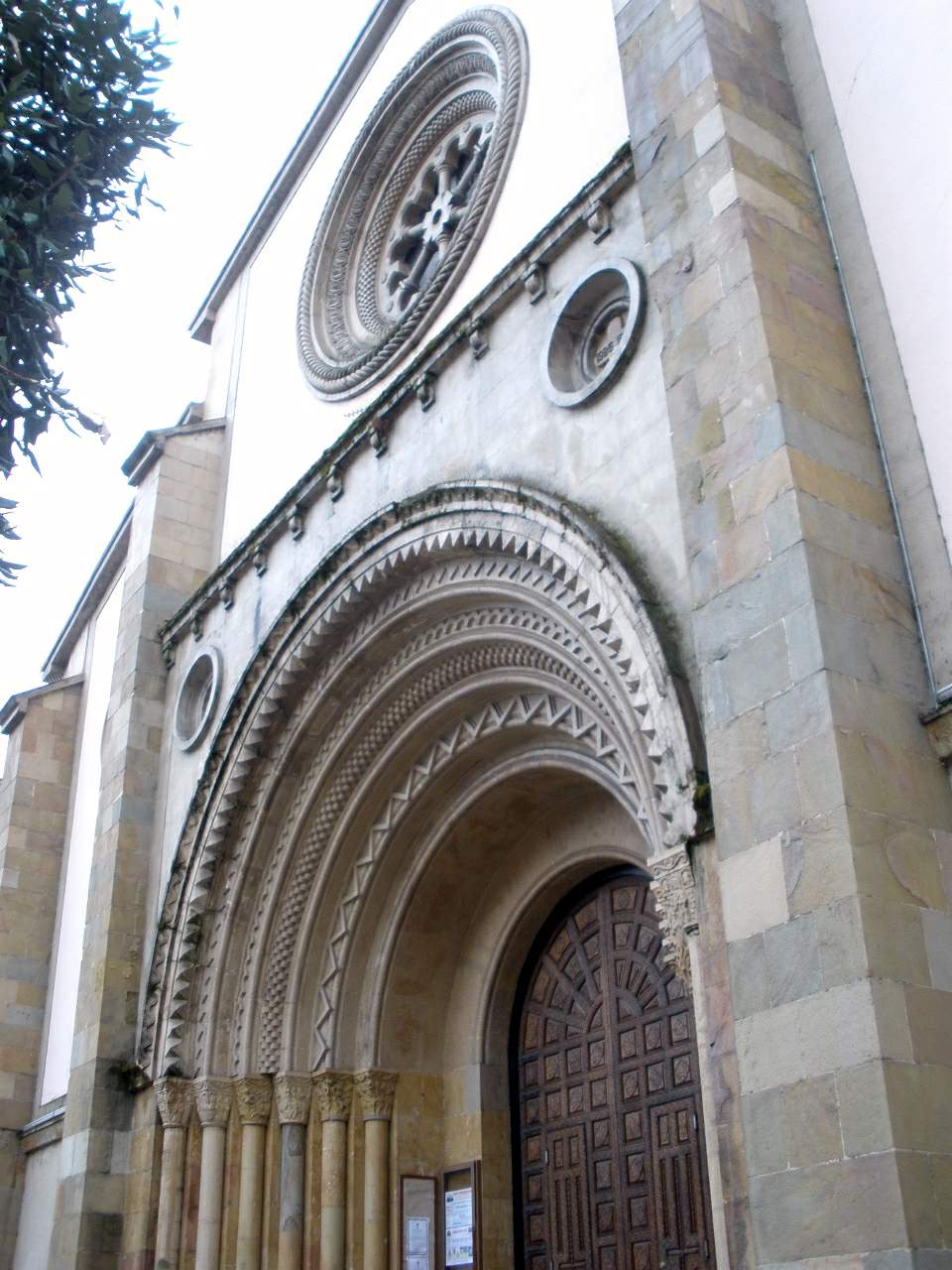 La Felguera (Langreo, Asturias)) - Iglesia de San Pedro